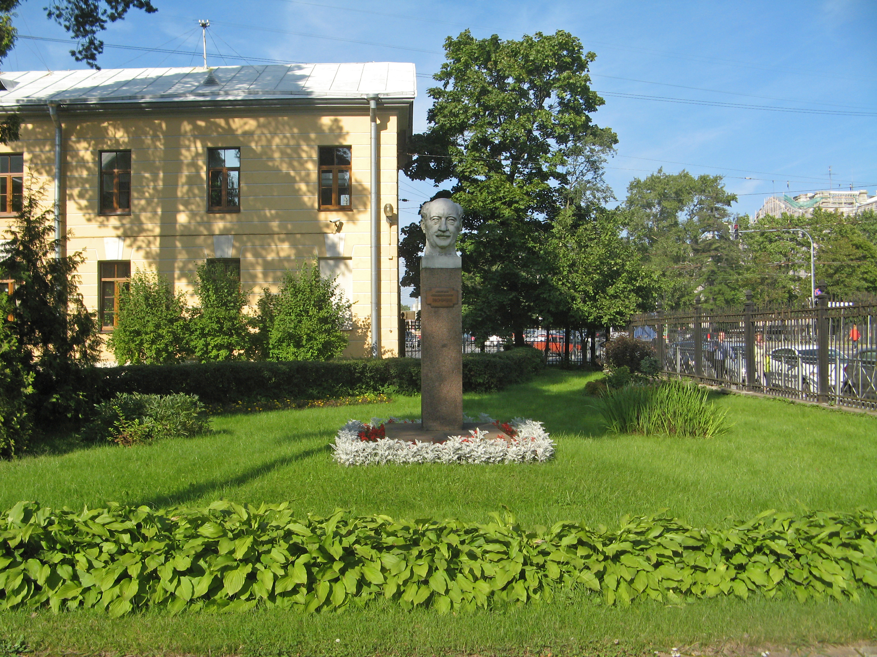 Курдонёр: Политехническая улица, 26, Выборгский район, Санкт-Петербург